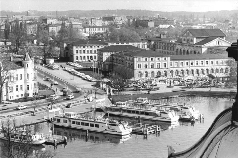 ADN-ZB Pätzold-30.4.1982 Schwerin: Schöne DDR-Neben dem ehemaligen Marstall befinden sich die Anlegestege für die modernen Binnenfahrgastschiffe der Schweriner Weißen Flotte. Eine halbe Million Schweriner und Gäste der Bezirksstadt fanden im vergangenen Jahr Erholung und Entspannung auf den acht Schiffen, die von hier aus fünf Routen über die Schweriner See fahren.